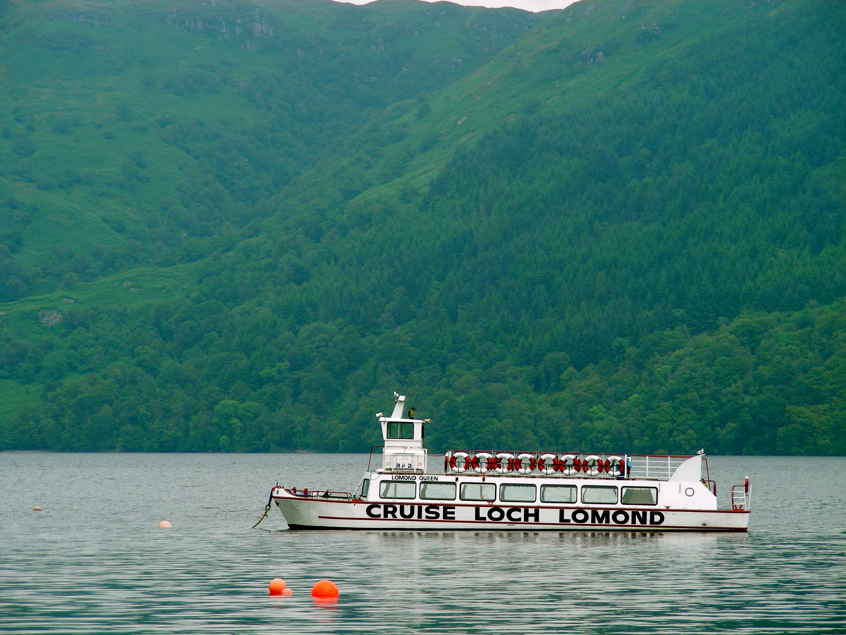 Loch Lomond Cruises